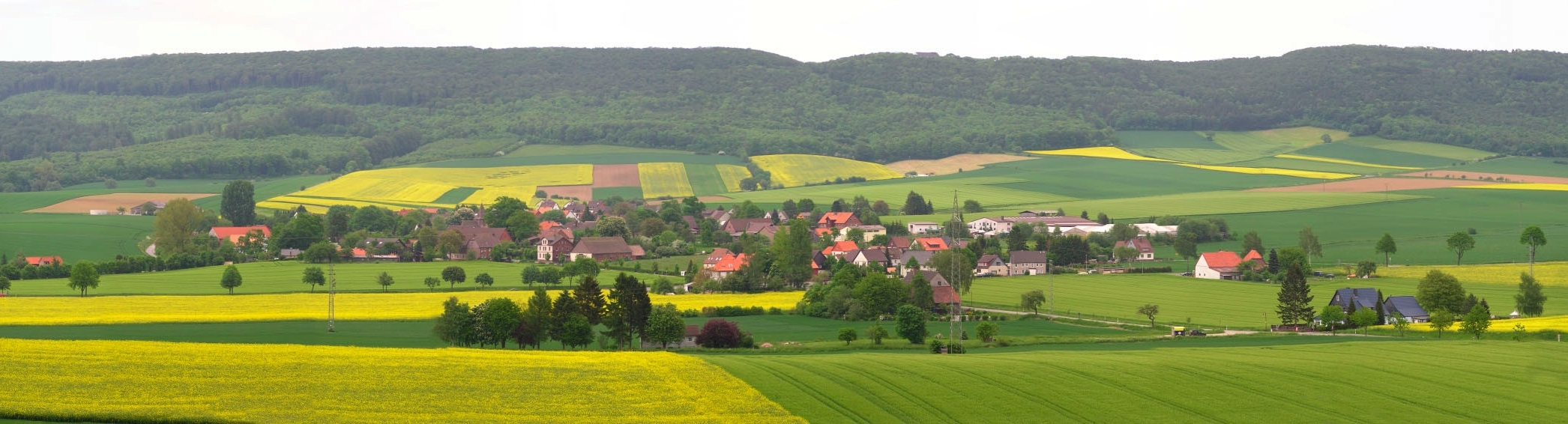 Blick auf Lüerdissen, Landkreis Holzminden, Deutschland. Standort: Wiese bei Oelkassen.